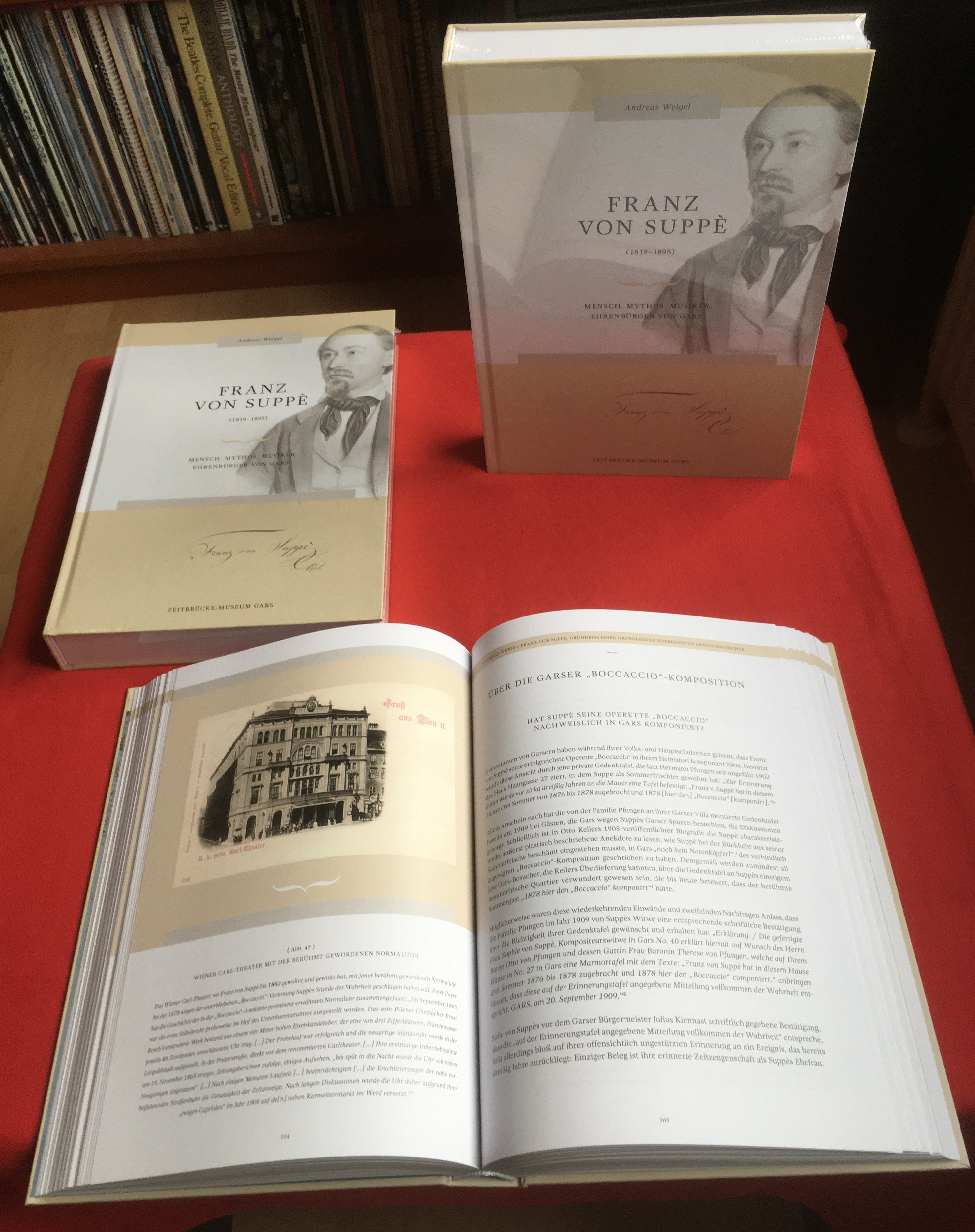 Je ein stehendes, liegendes bzw. aufgeschlagenes Exemplar der im Oktober 2019 veröffentlichten Franz-von-Suppè-Monografie: Andreas Weigel: Franz von Suppè (1819–1895). Mensch. Mythos. Musiker. Ehrenbürger von Gars. Begleitpublikation zur Jubiläums-Ausstellung des Zeitbrücke-Museums Gars. Mit Beiträgen von Andreas Weigel, Anton Ehrenberger, Ingrid Scherney und Christine Steininger. (Gars am Kamp) 2019. ISBN 978-3-9504427-4-8. S.164-165..